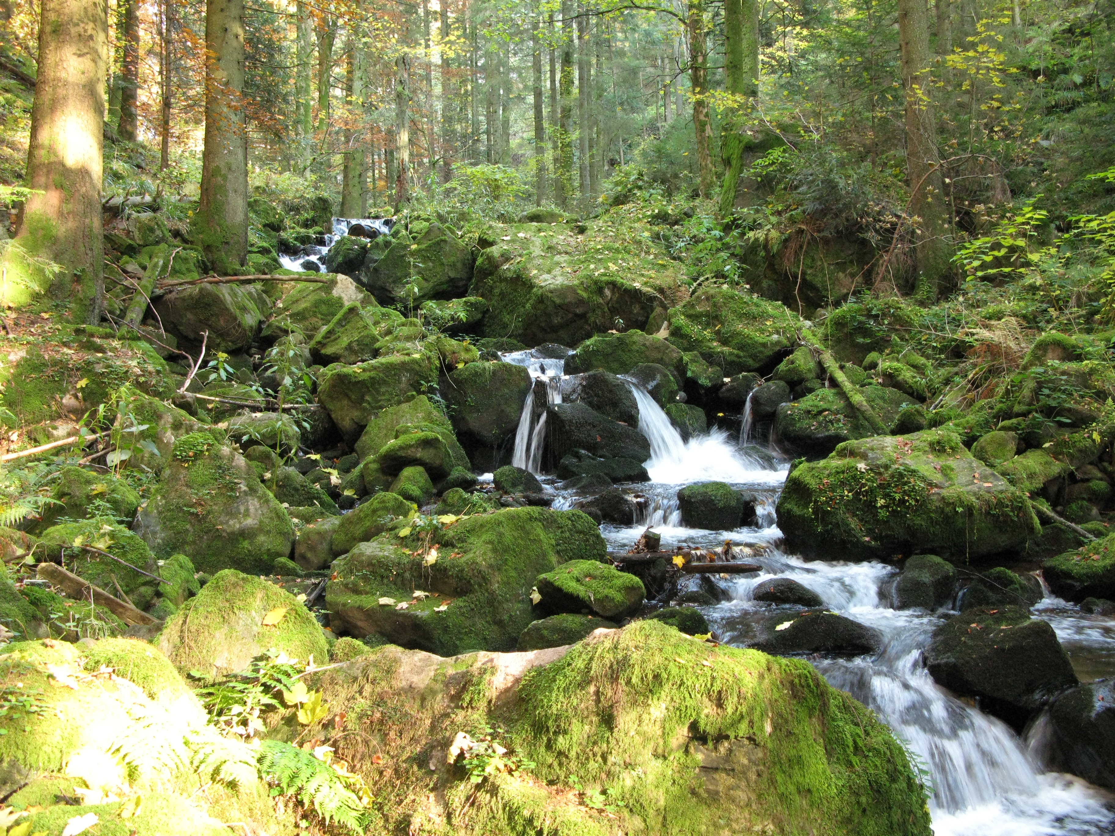 Teichschlucht am Zweitälersteig im Simonswäldertal im Schwarzwald